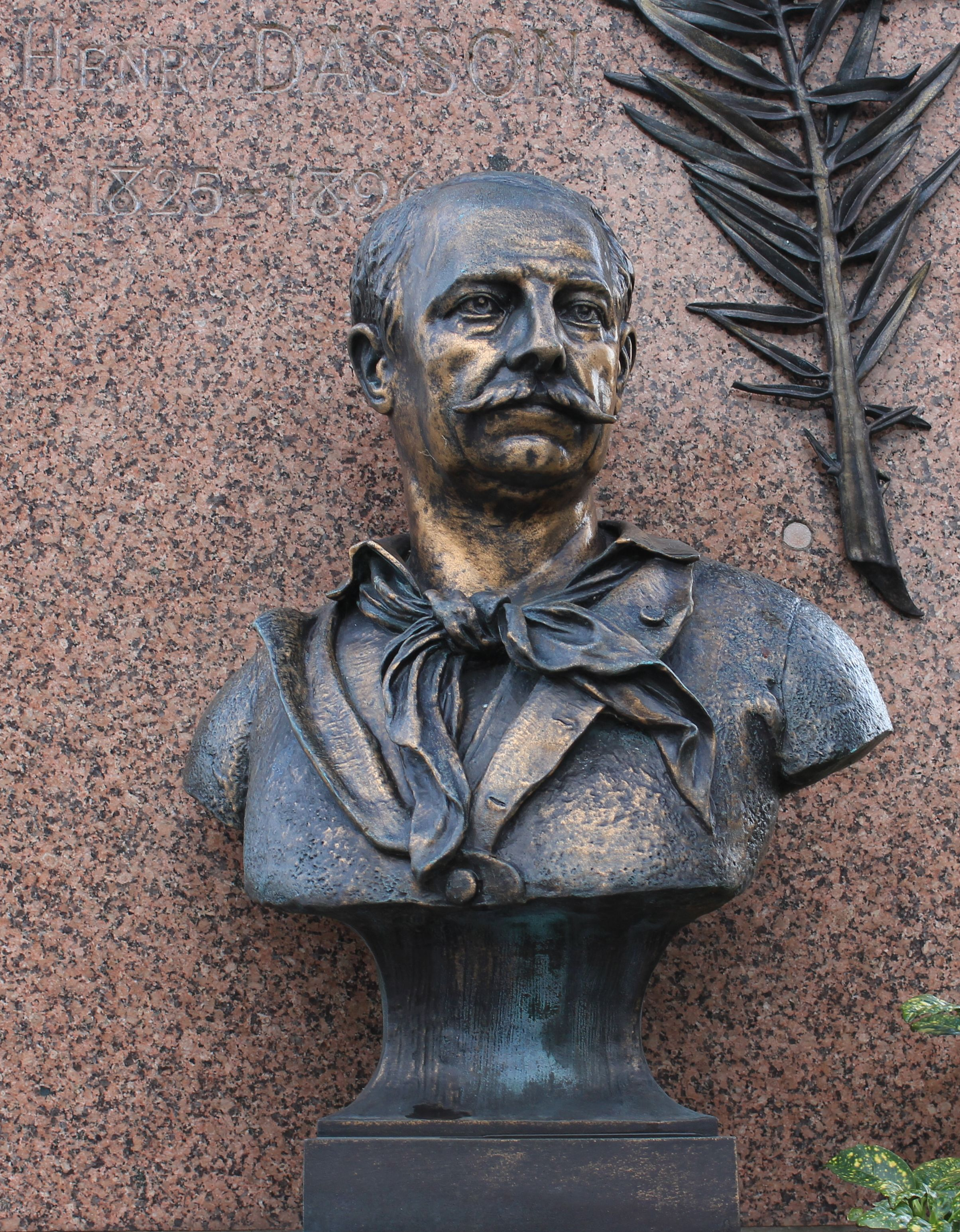 Monument orné d'un buste en bronze signé J. Dallier.